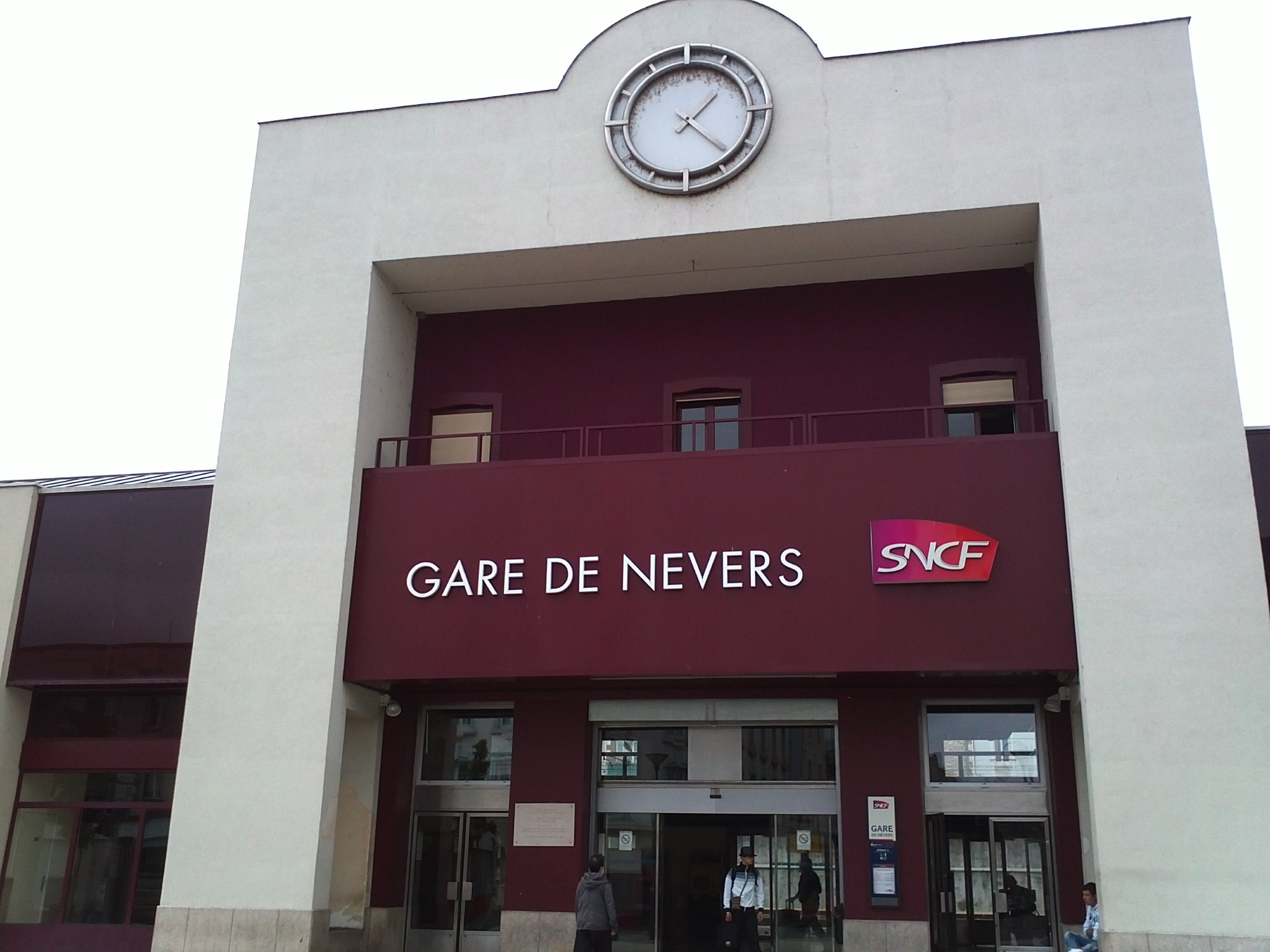 讷韦尔站正门